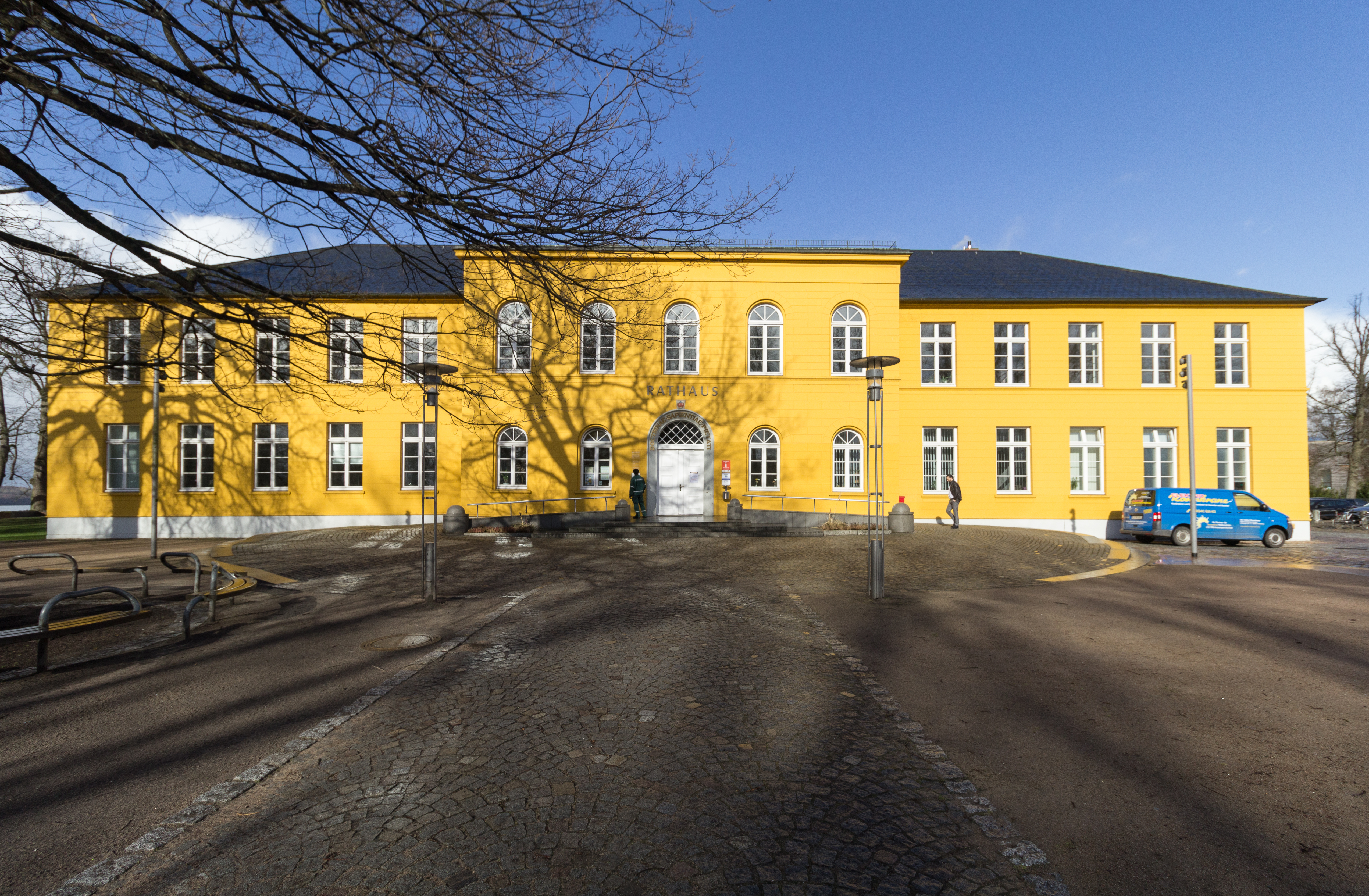 Rathaus Ratzeburg, Unter den Linden 1